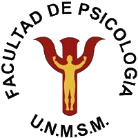 La letra "φ" como carácter inicial de la palabra psicología en griego con la silueta insertada de un hombre levantando ambos brazos, en señal del logro pleno del bienestar personal y social; indicando el encargo social de la carrera de psicología de empoderar a las personas para este logro.